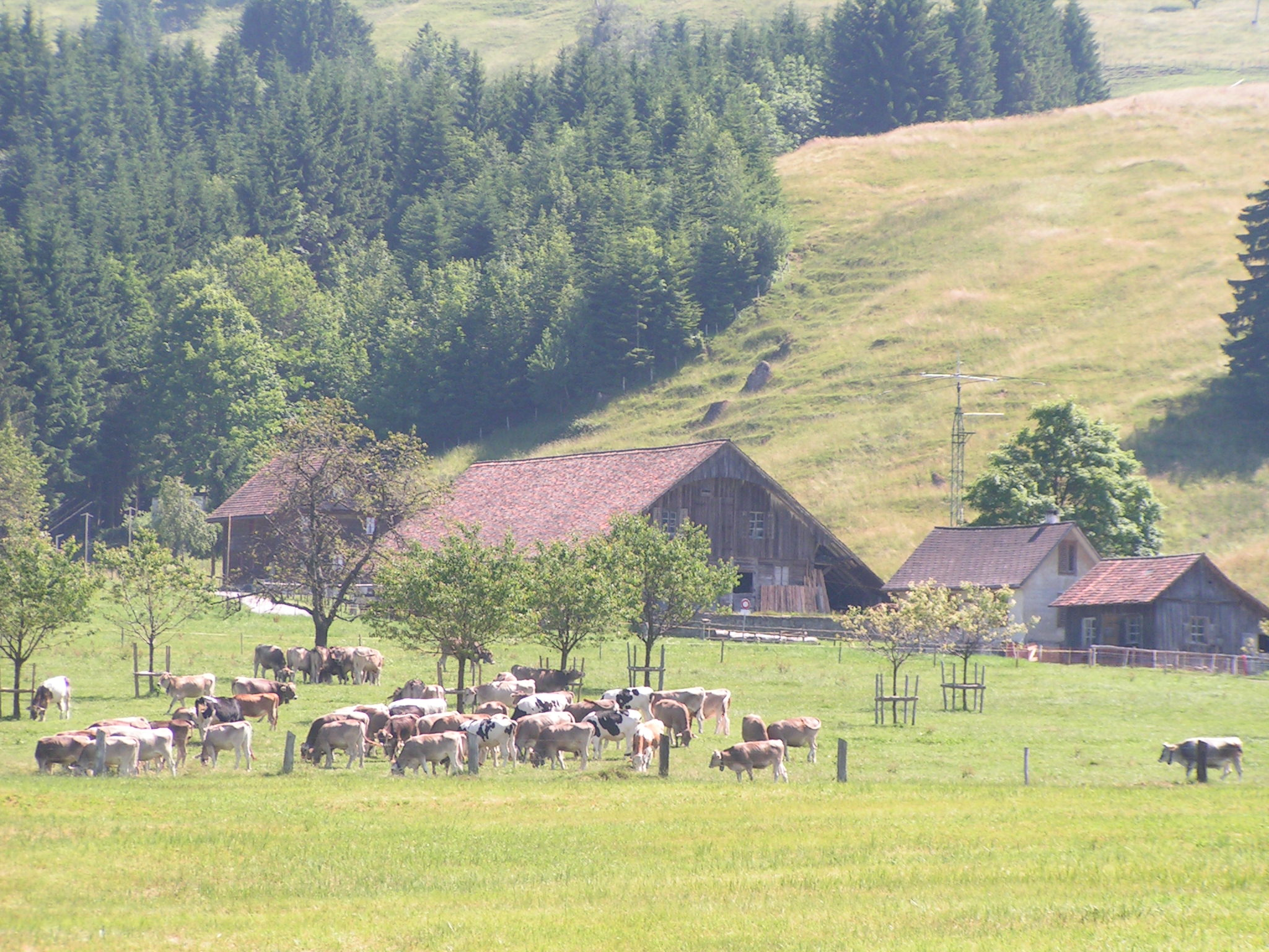 Seebodenalp oberhalb von Küssnacht (Schwyz)